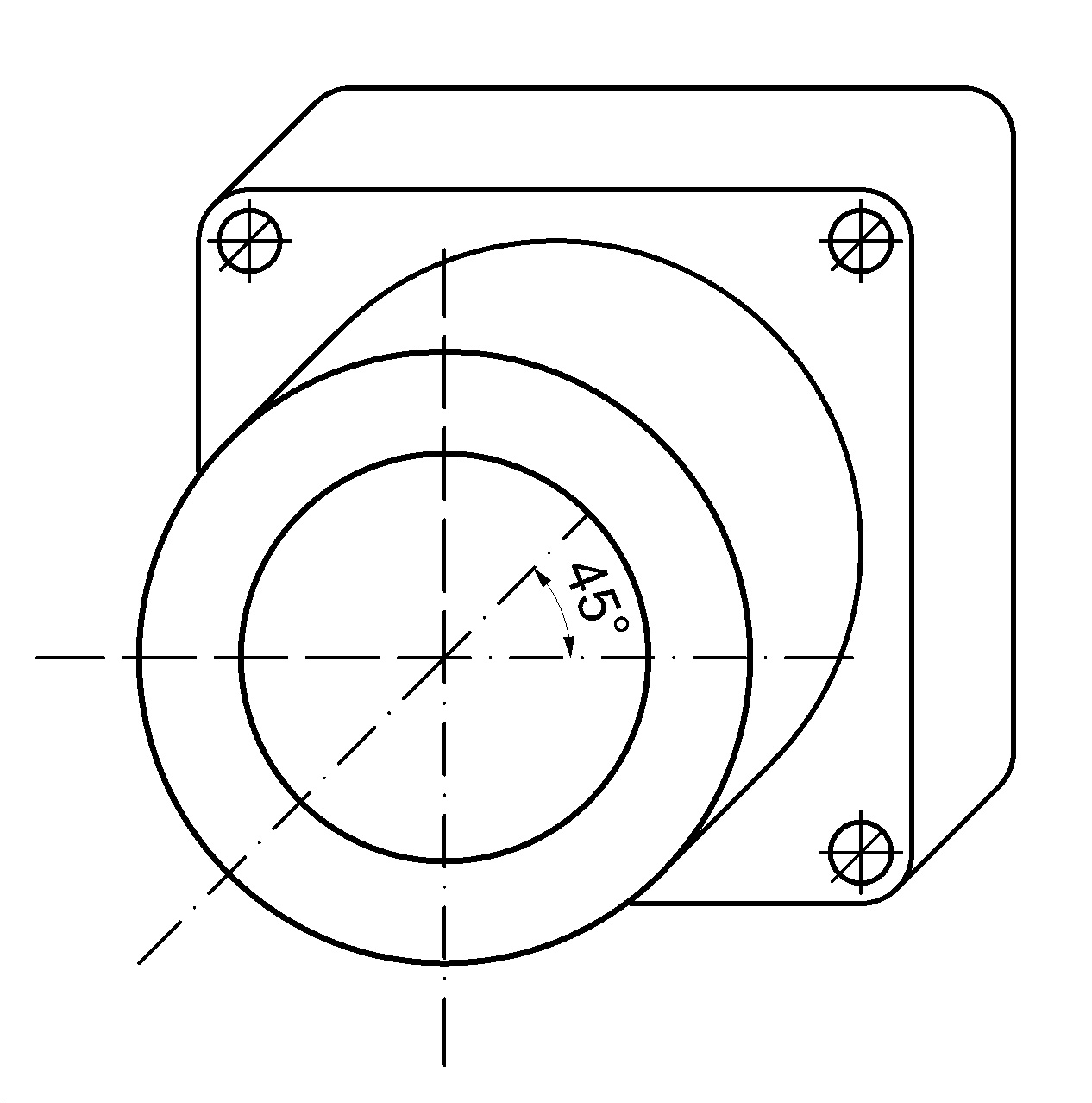 Elemento mecânico em perspectiva cavaleira.